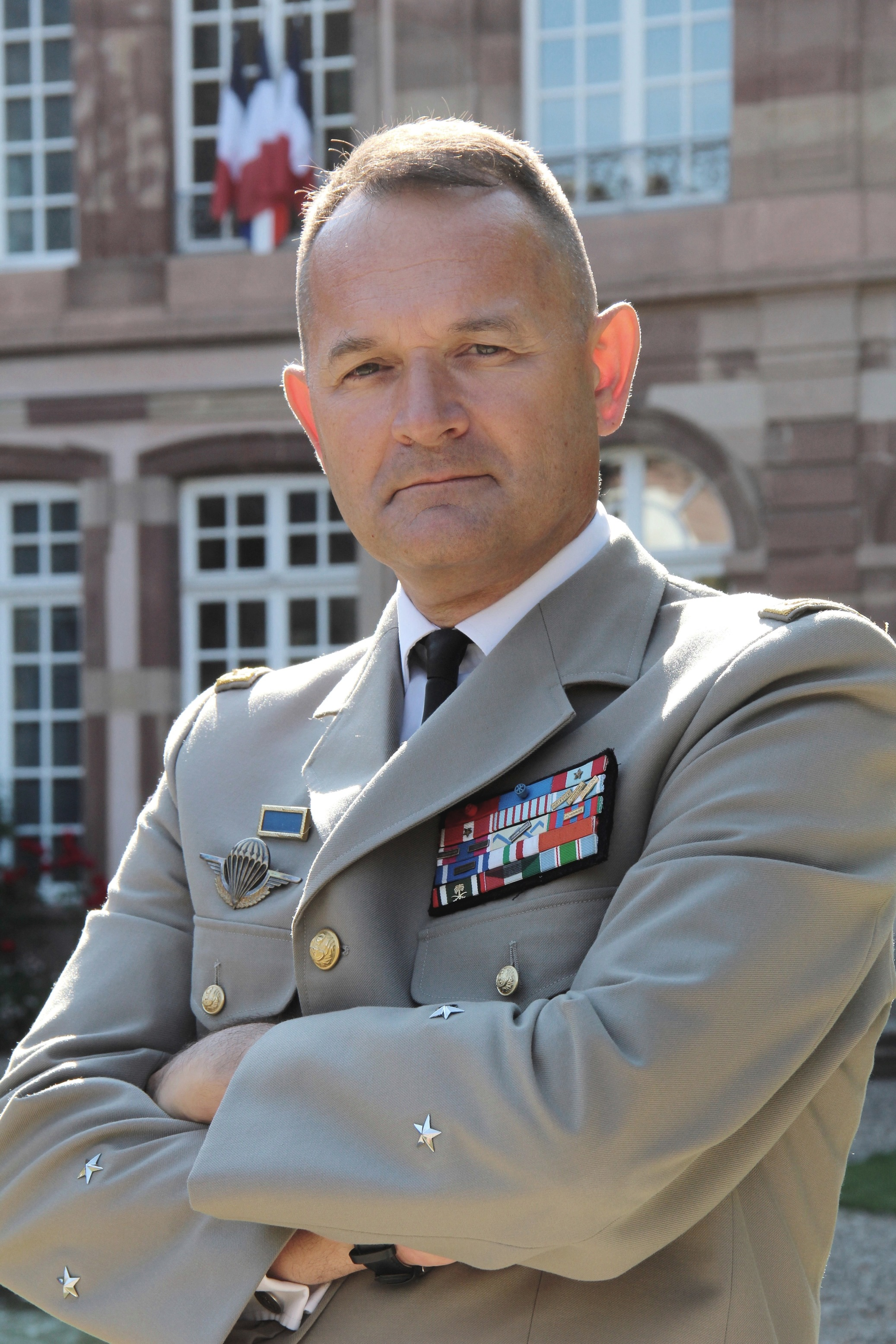 Photo prise le 30 août 2016 au palais du gouverneur militaire de Strasbourg.